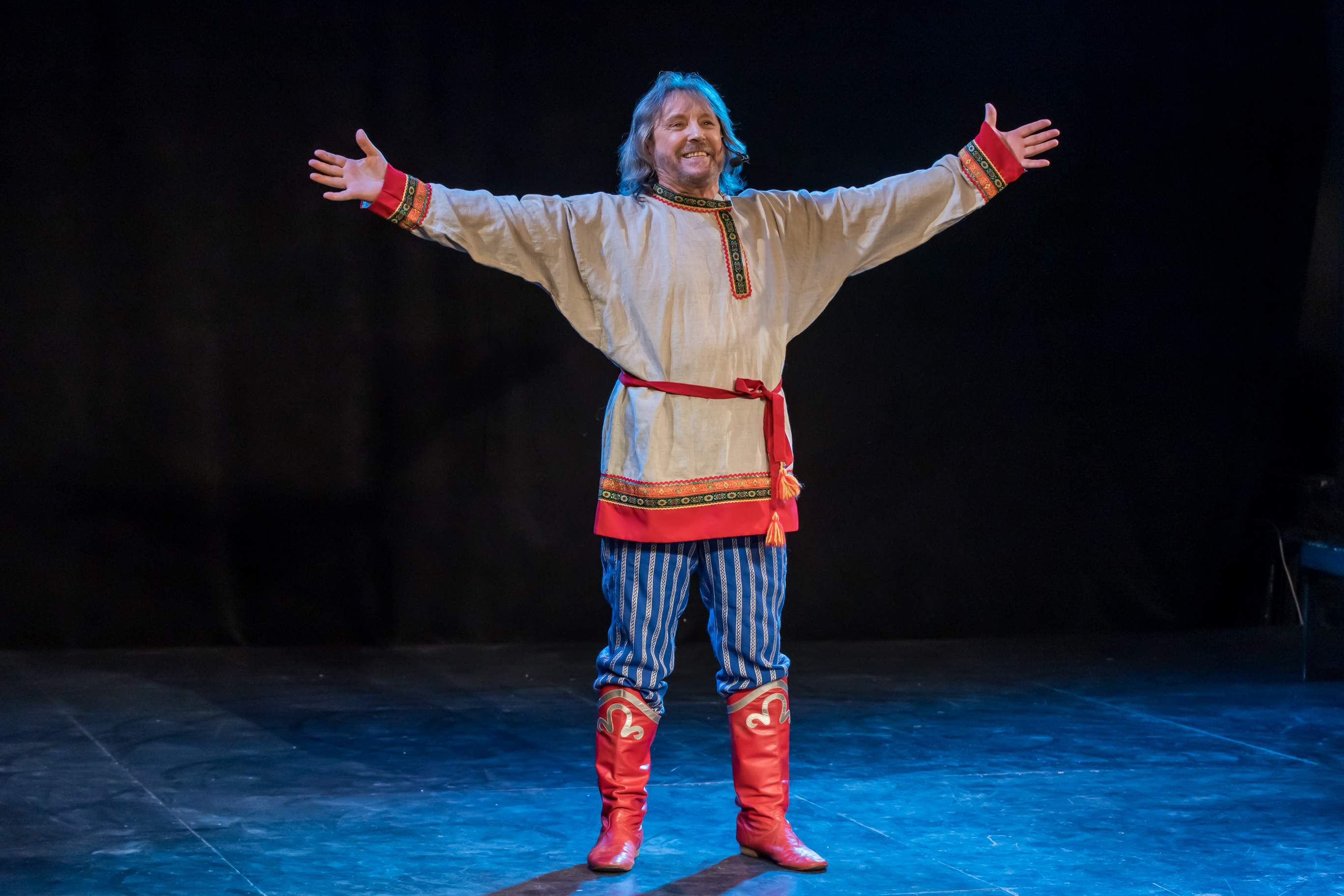 Владимир Дяденистов в образе Есенина на концерте к 45-летию Владимира Дяденистова на сцене